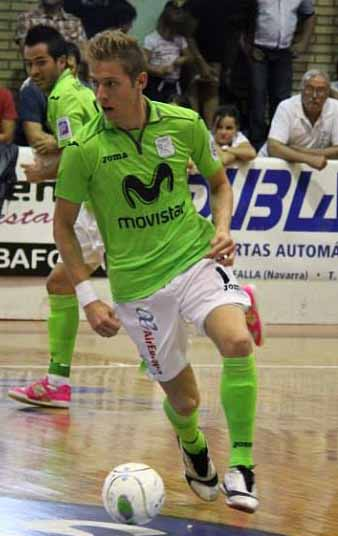 foto del jugador Bateria tomada en el pabellon caja madrid de alcala de henares